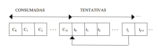 Bayou